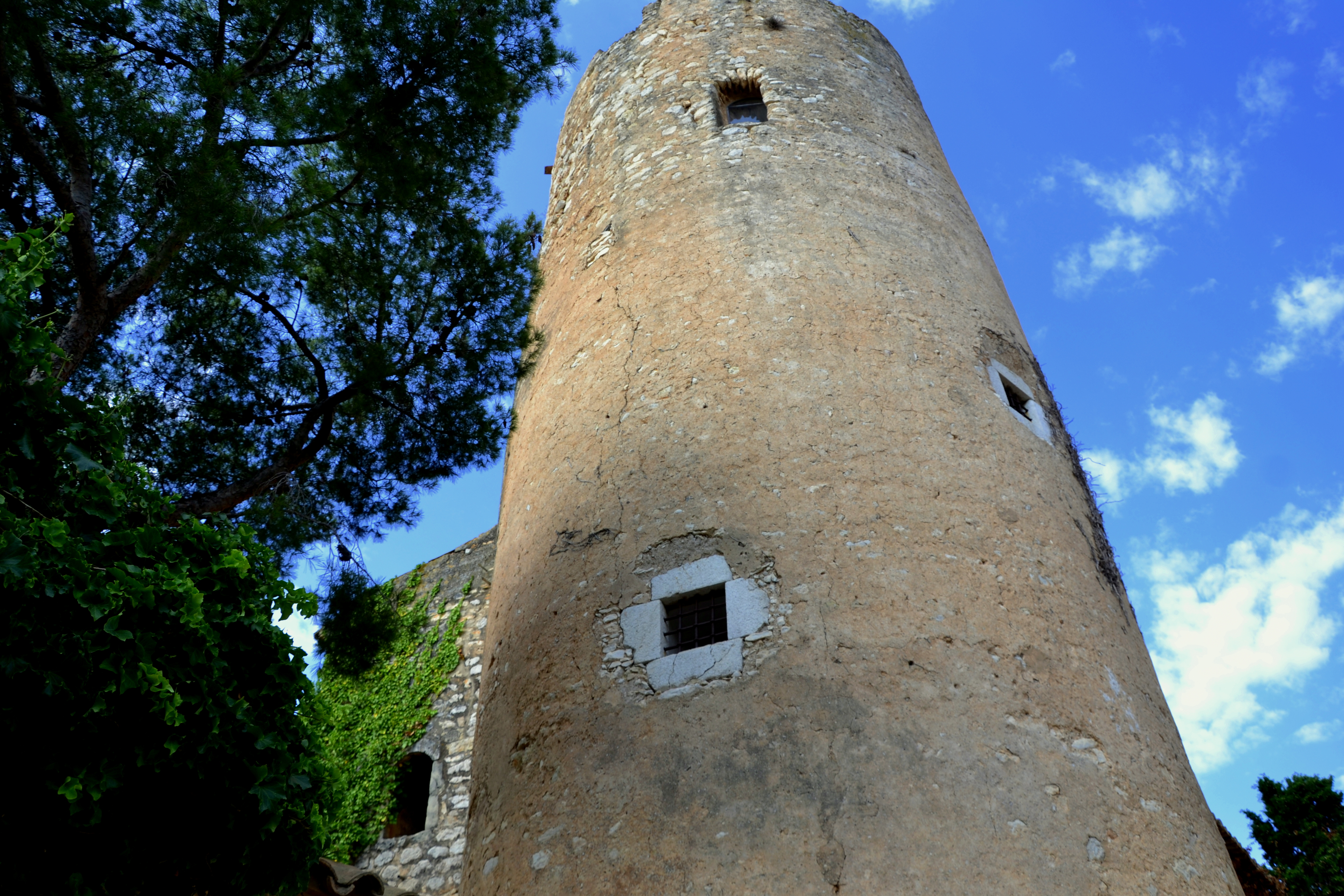 Castell de Ribes (Sant Pere de Ribes)